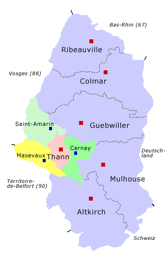 Arrondissement Thann mit Verwaltungsgiederung und Lage im Département Haut-Rhin.